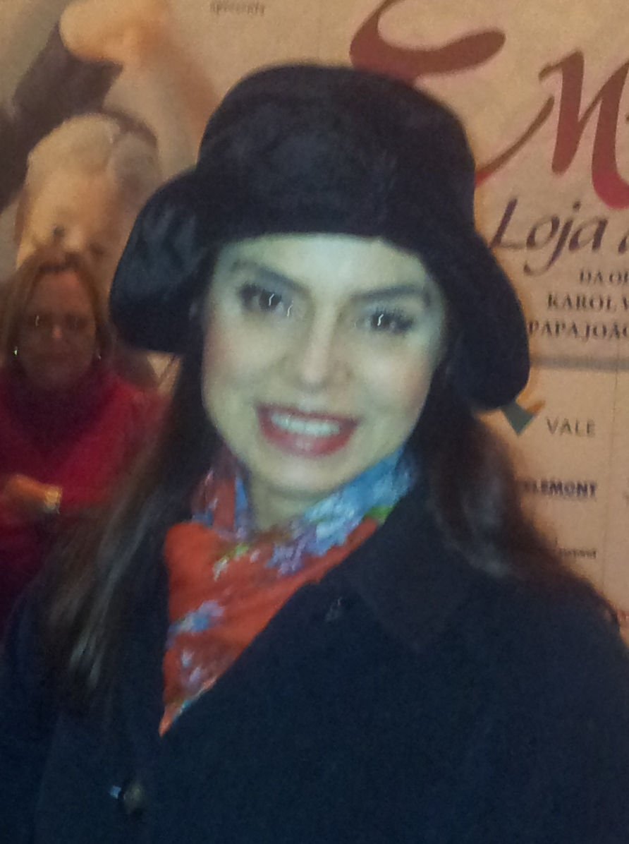 Françoise Forton, atriz brasileira, após a apresentação da peça "Enlace - A Loja do Ourives", em São Paulo.